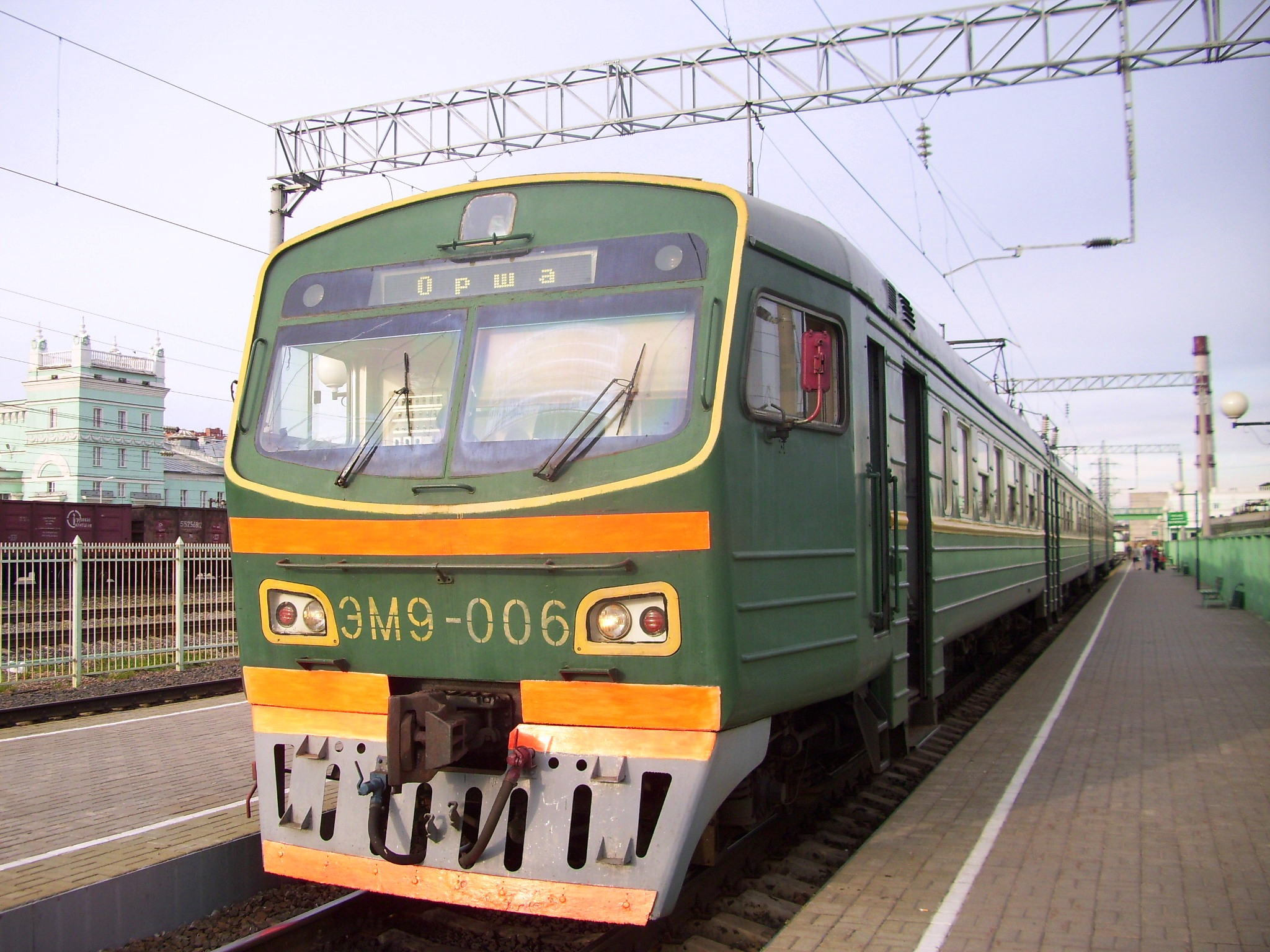 Электропоезд ЭМ9-006 на станции Смоленск